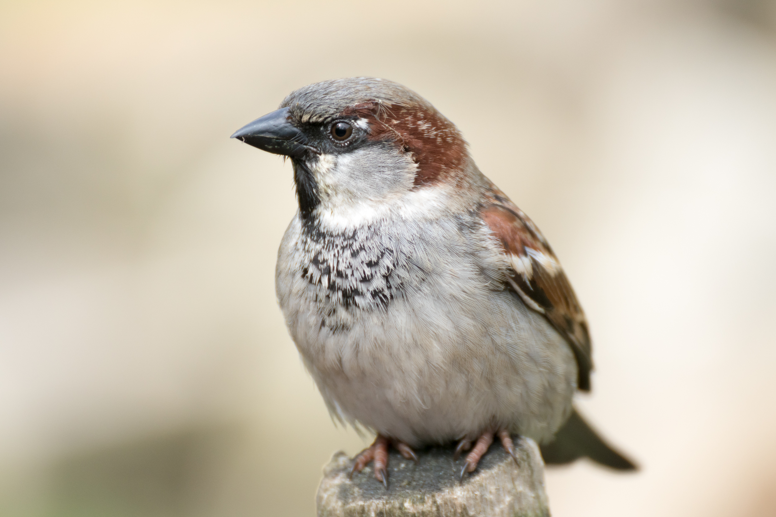 huismus, man house sparrow, male